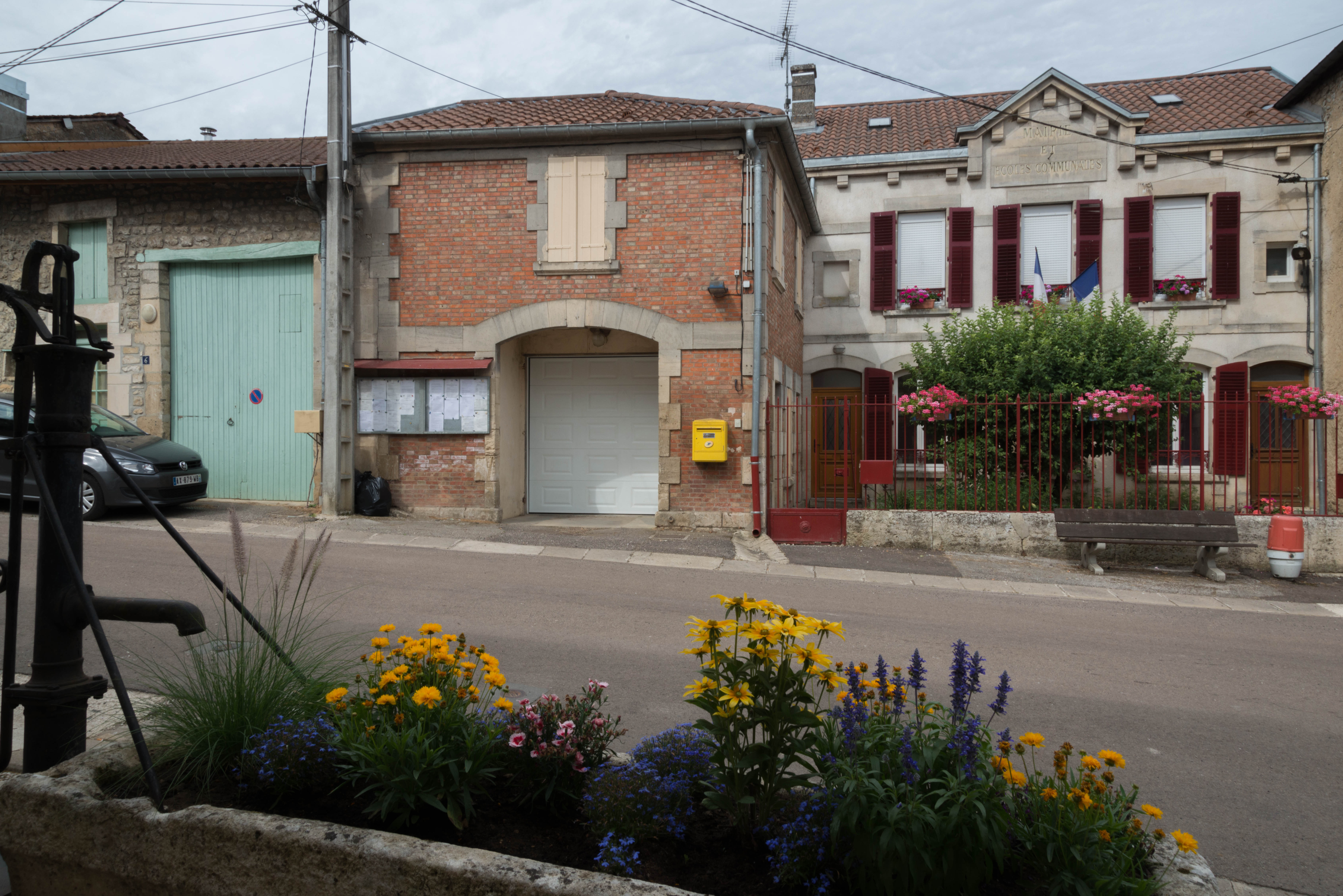 Mairie de Lavincourt